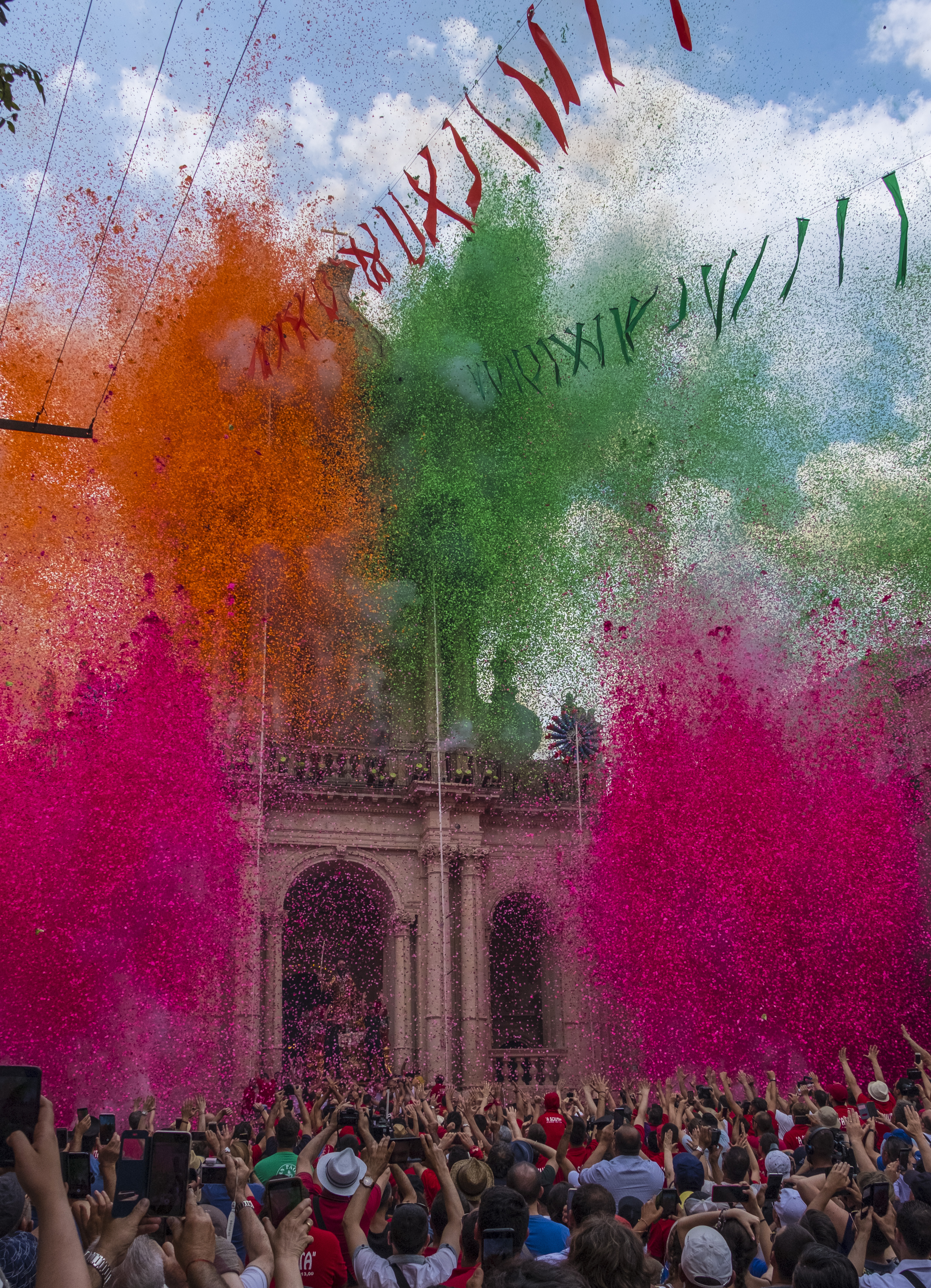 Uscita del fercolo col Santo